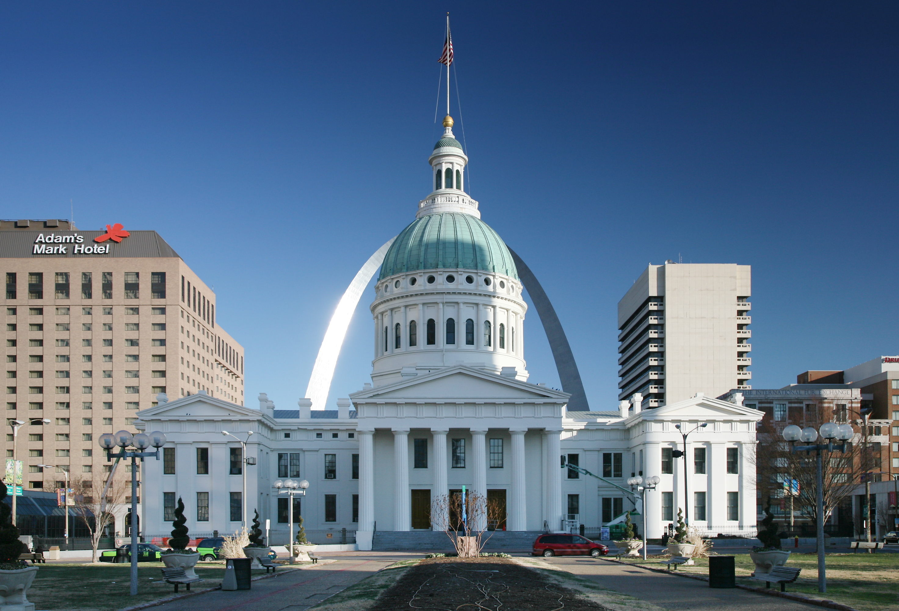 Old Courthouse and Jefferson National Expansion Memorial (Gateway Arch) in St. Louis, MO